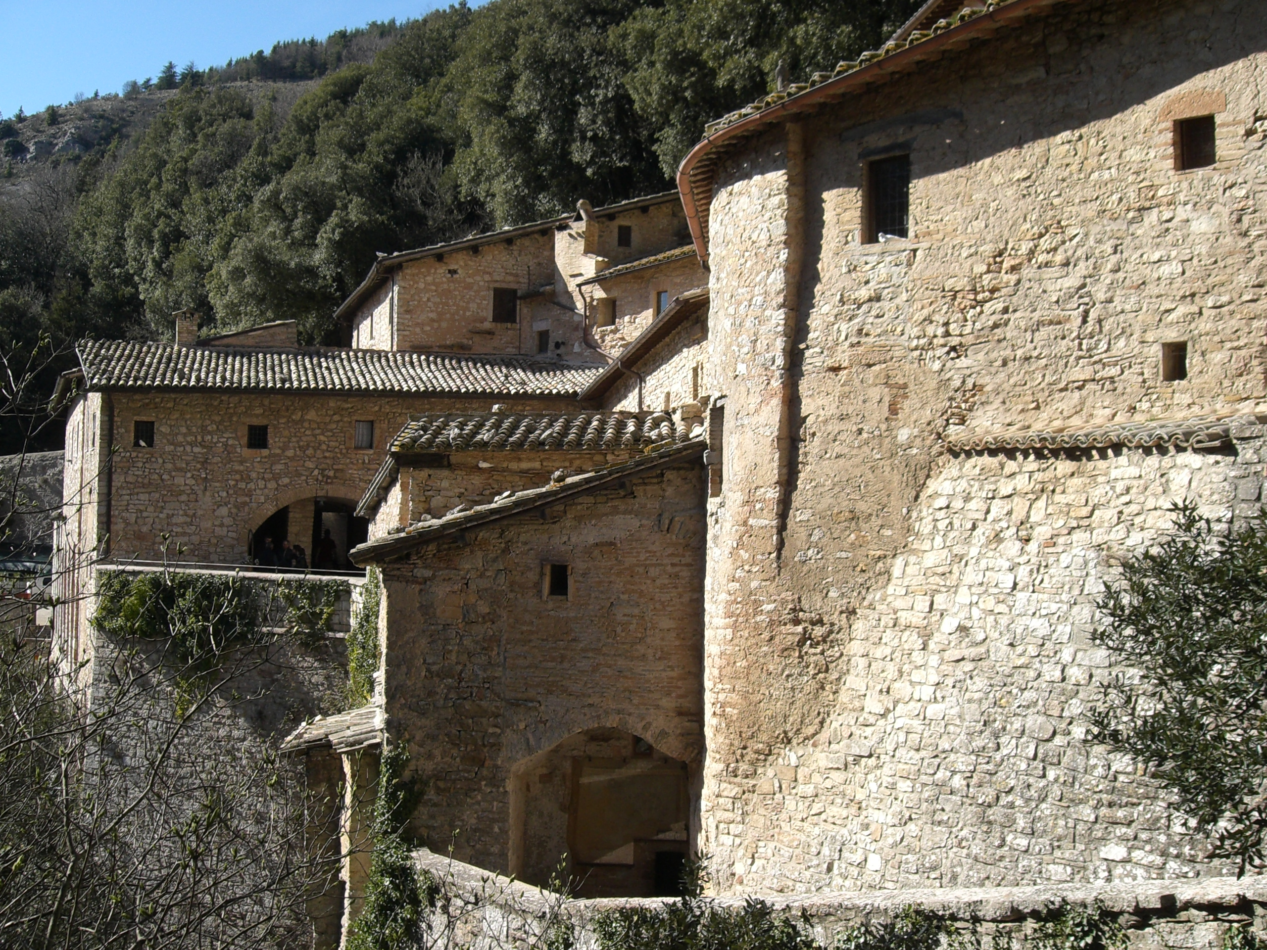 Eremo delle Carceri bei Assisi. Aufgenommen im April 2006.